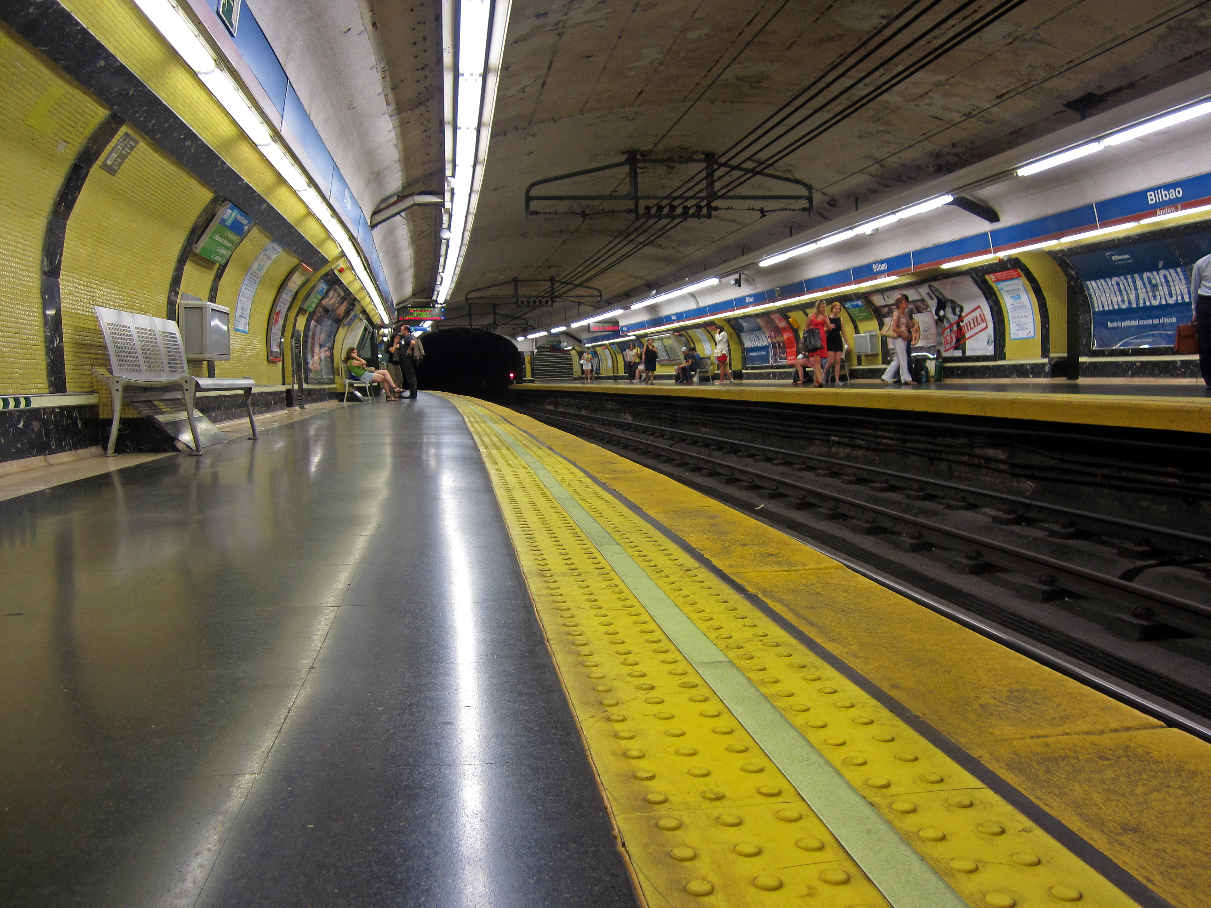 Estación de Bilbao del Metro de Madrid. Andén Línea 4 dirección Argüelles